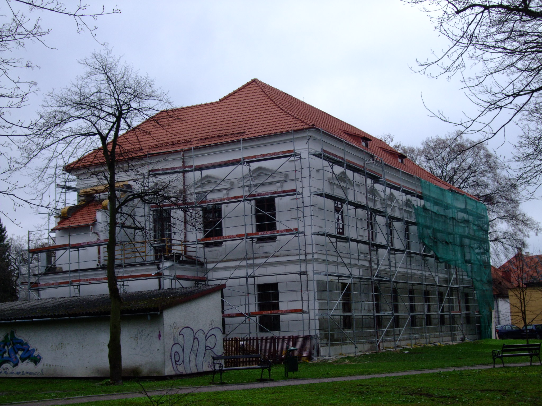 Pałac Vauxhall w Krzeszowicach, wybudowany przez księżną Izabele Lubomirską w latach 1783-1786 (w trakcie remontu).